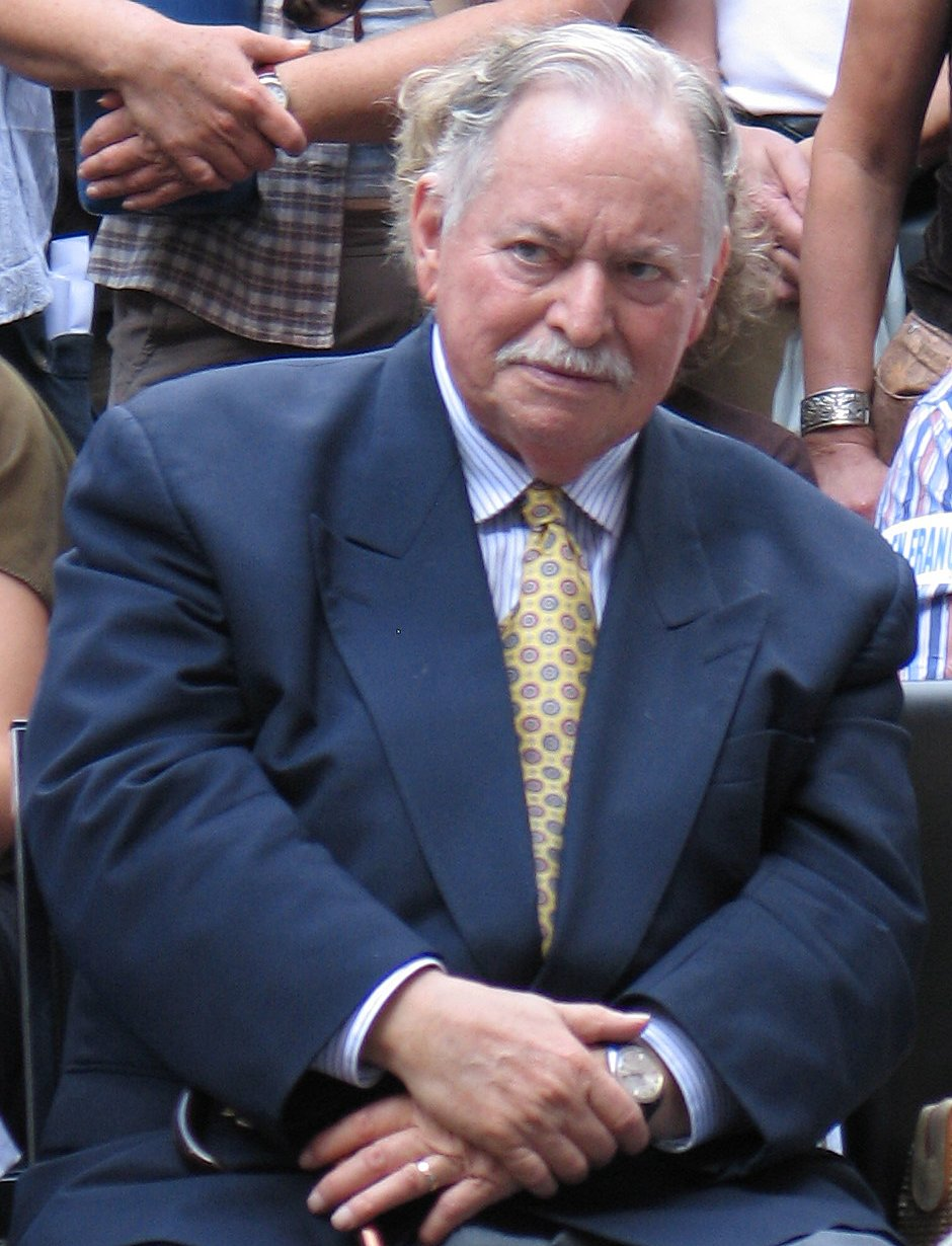 Jacques Parizeau, 26e premier ministre du Québec.